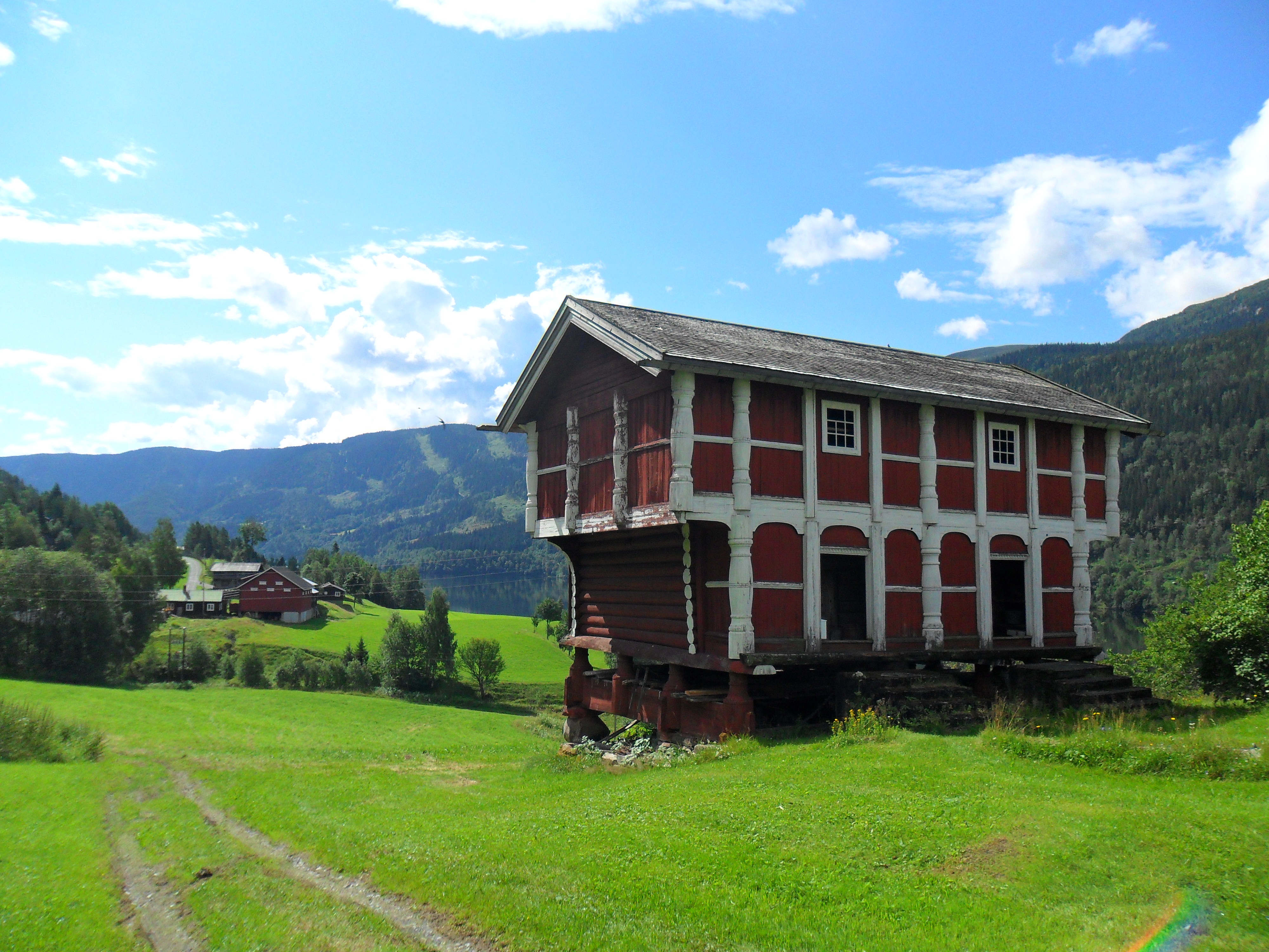 Kravik Mellom, middelalderloft i Nore & Uvdal kommune, Buskerud.